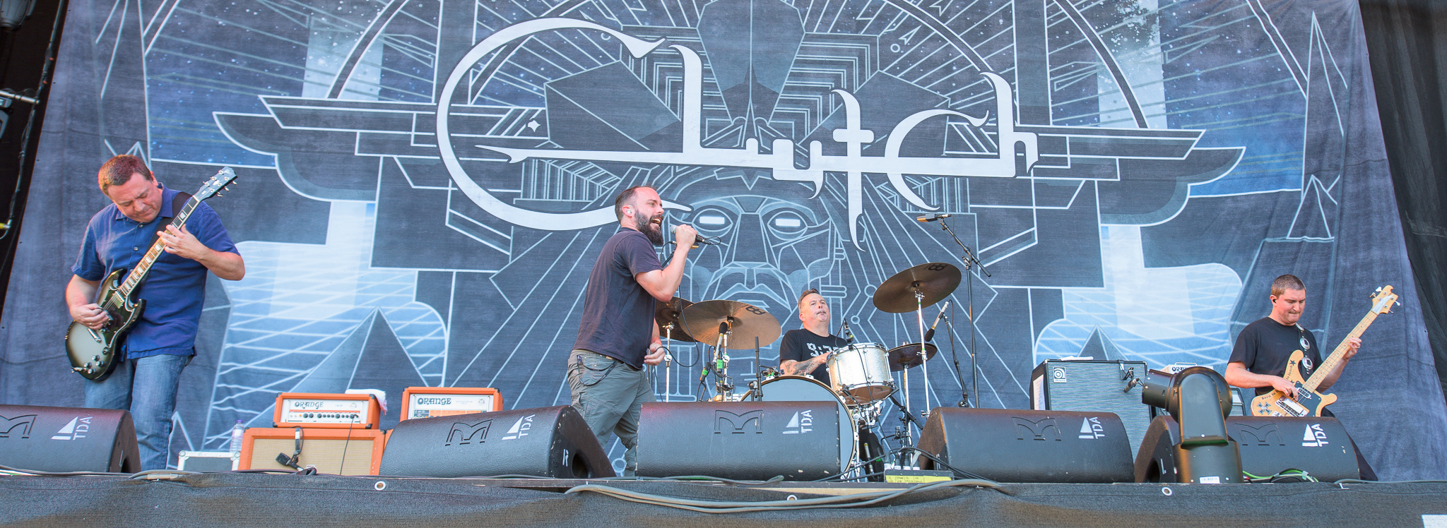 ARGO-Konzerte,Beck's Park Stage,Clutch,Dan Maines,Festival,Jean Paul Gaster,Konzert,Livekonzert,Livemusik,Musik,Neil Fallon,RiP,Rock im Park 2015,Tim Sult